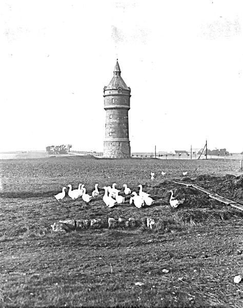 Billede fra 1933 af Vandtårnet på Randersvej med græssende gæs i forgrunden